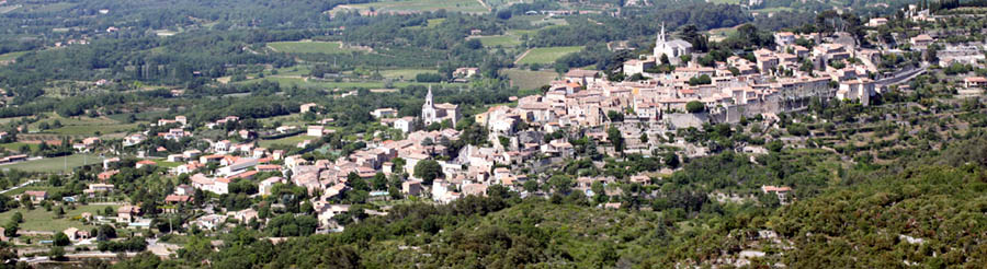 the village of Bonnieux, Vaucluse, France